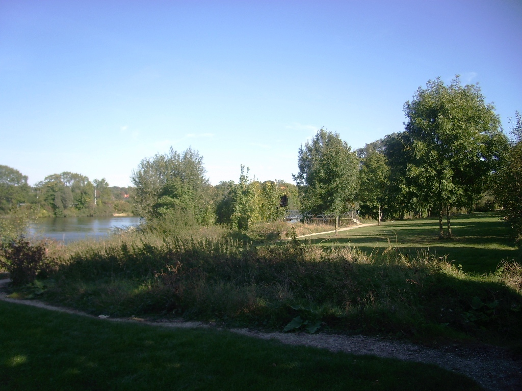 Parc des bords de Seine à Évry (Essonne)